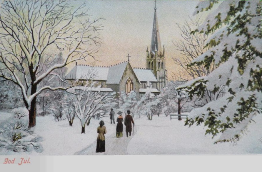 Svenskt julkort från 1905. Motiv: Besökare på väg till julotta i Hagakyrkan.